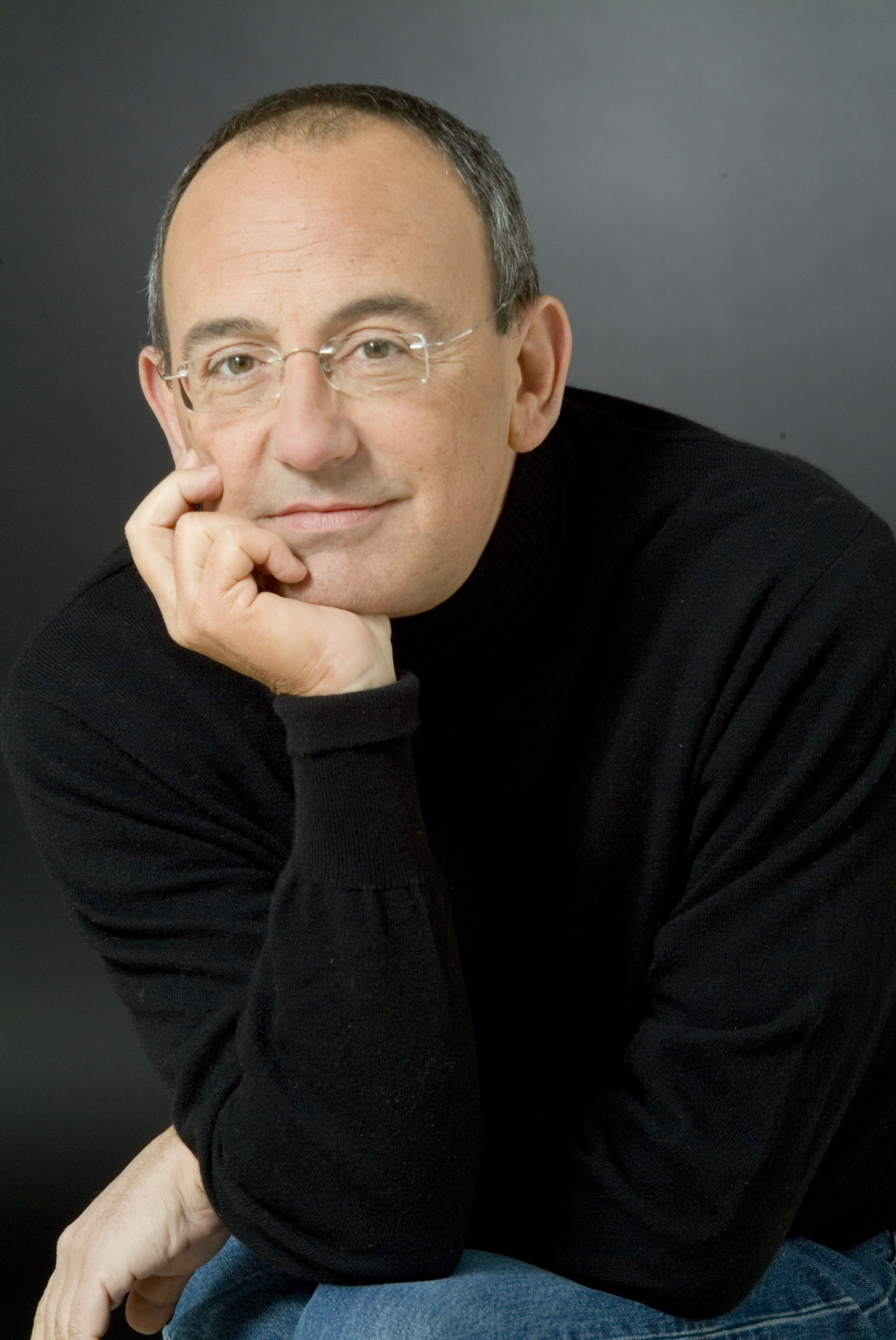 PHOTO DE ROMANO MUSUMARRA